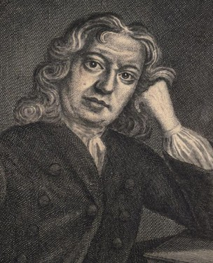 George Psalmanazar (1679?-1763) est un imposteur qui a prétendu être le premier Formosan à visiter l'Europe.